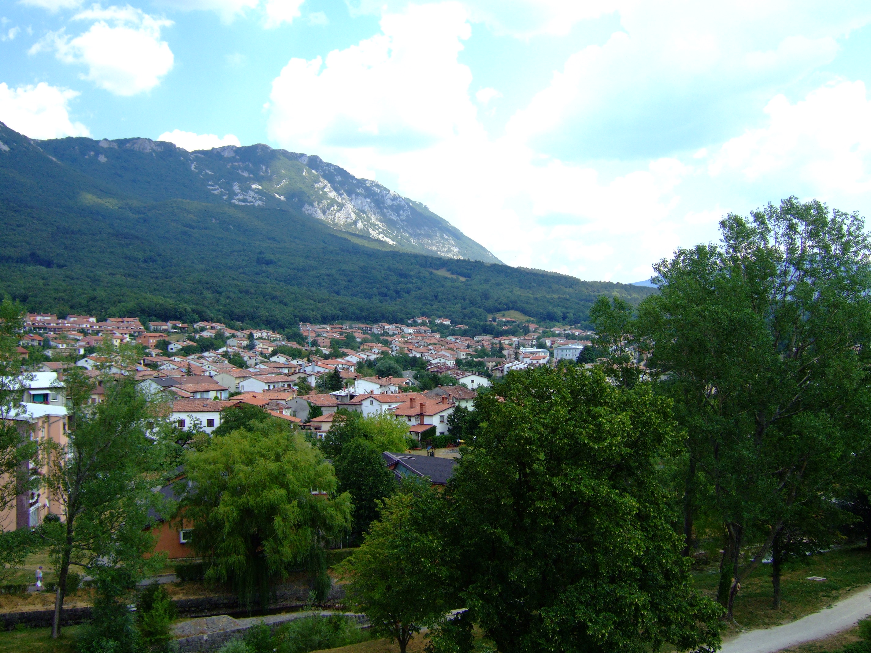 Ajdovščina, Slovenia